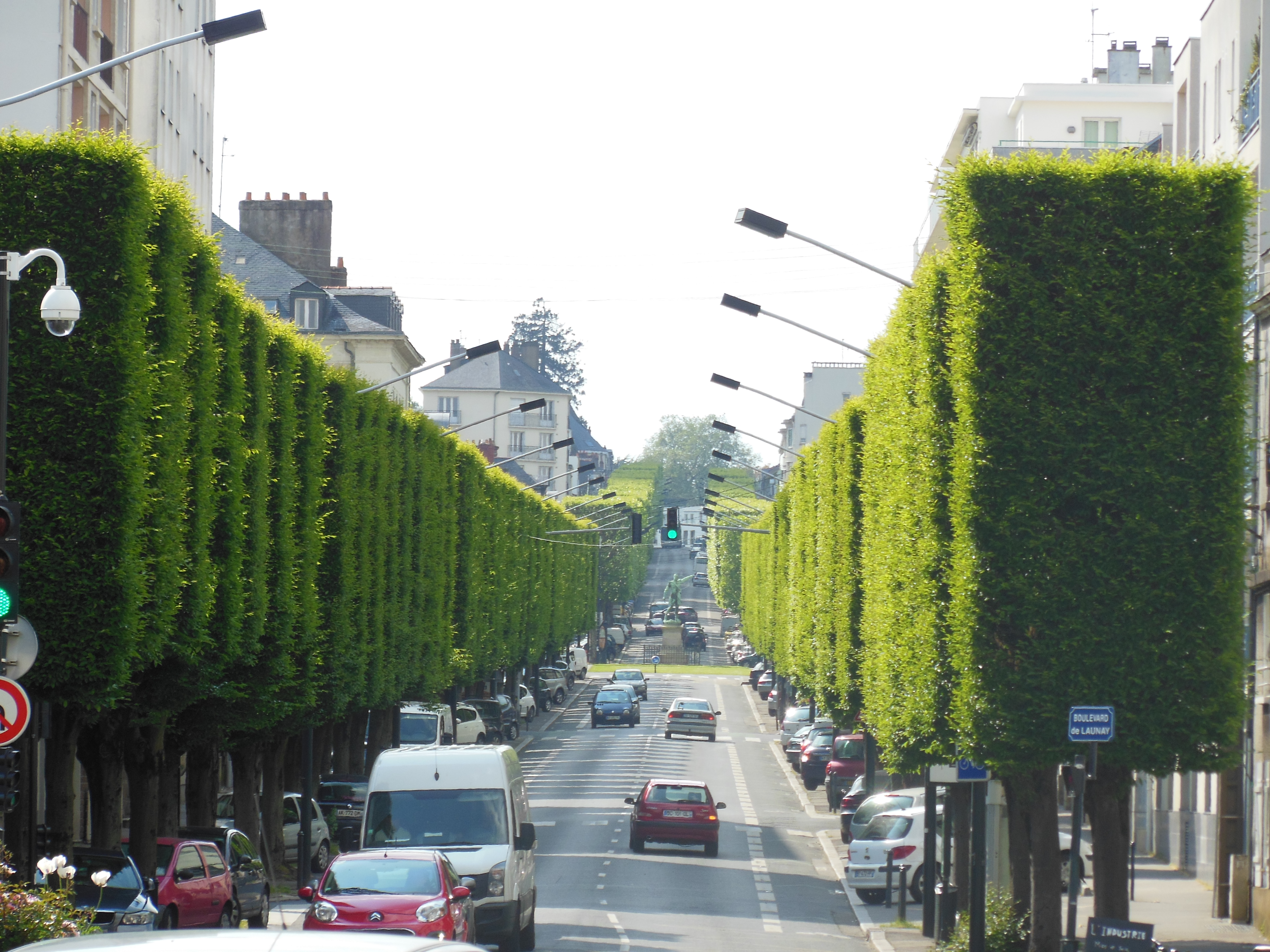 Boulevard de Launay (Nantes), vu de la place René Bouhier en direction de la place Général Mellinet (dont on voit la statue)